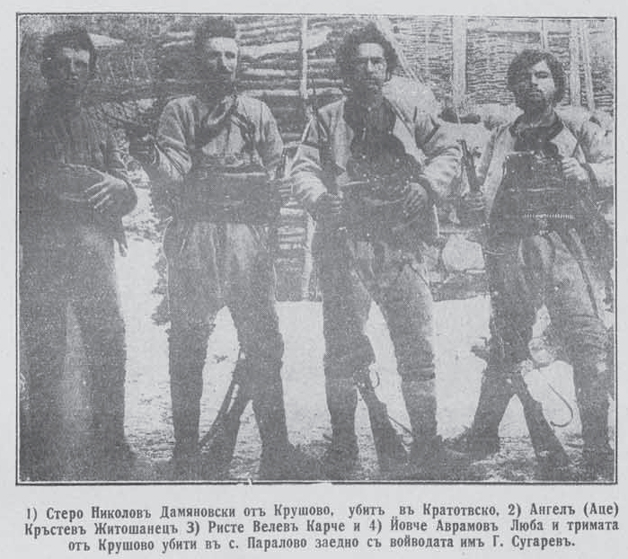 Krushevo revolutionaries